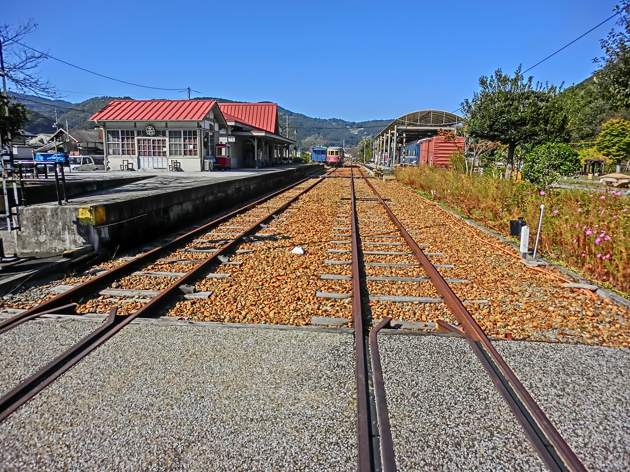 吉ヶ原駅 岡山県道703号備前柵原自転車道線 旧同和鉱業片上鉄道 岡山県